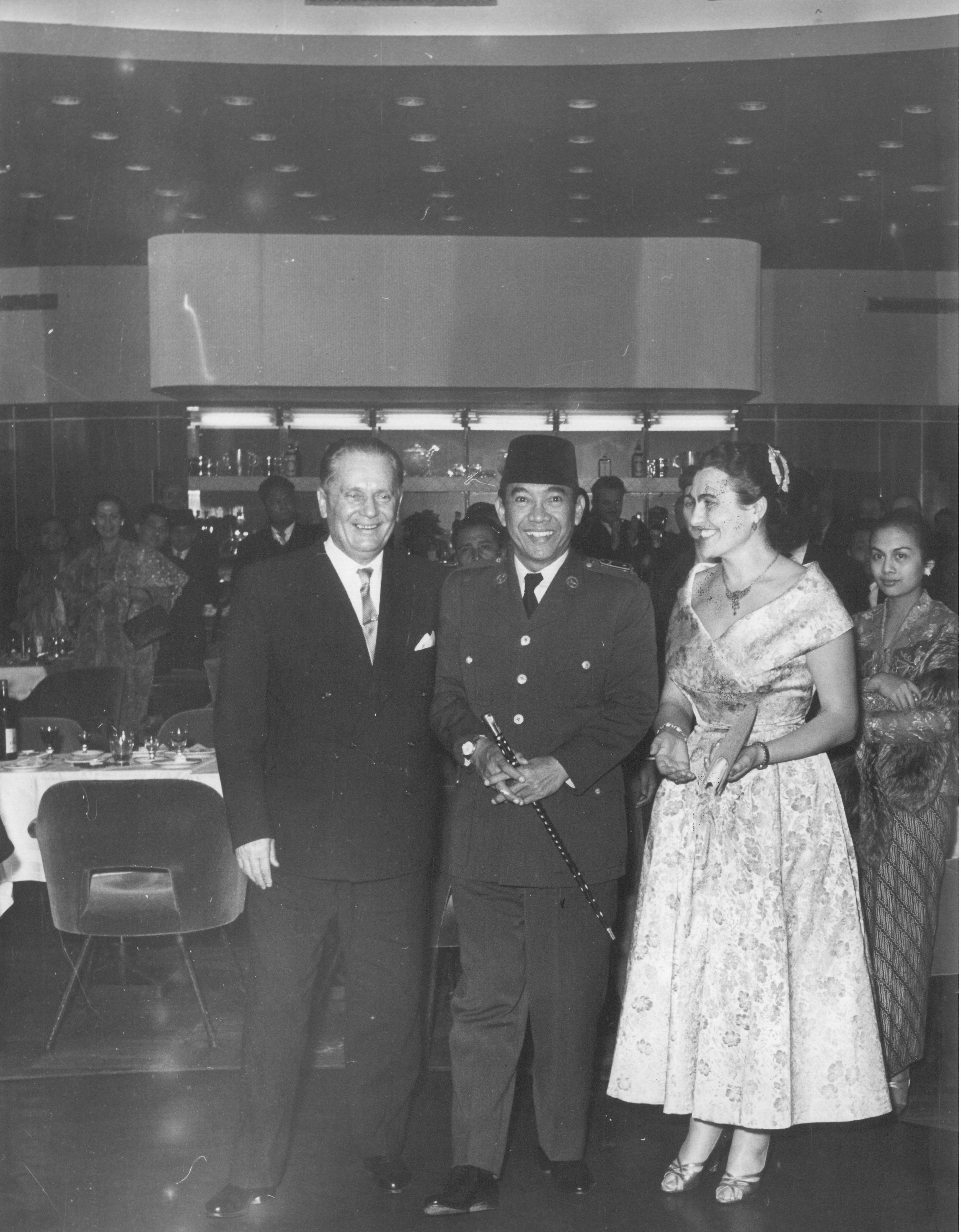 Sukarno, lider Indonezije, Tito i Jovanka Broz, u Beogradu, 1958.foto: Stevan Kragujević (po odobrenju kćerke Tanje Kragujević).